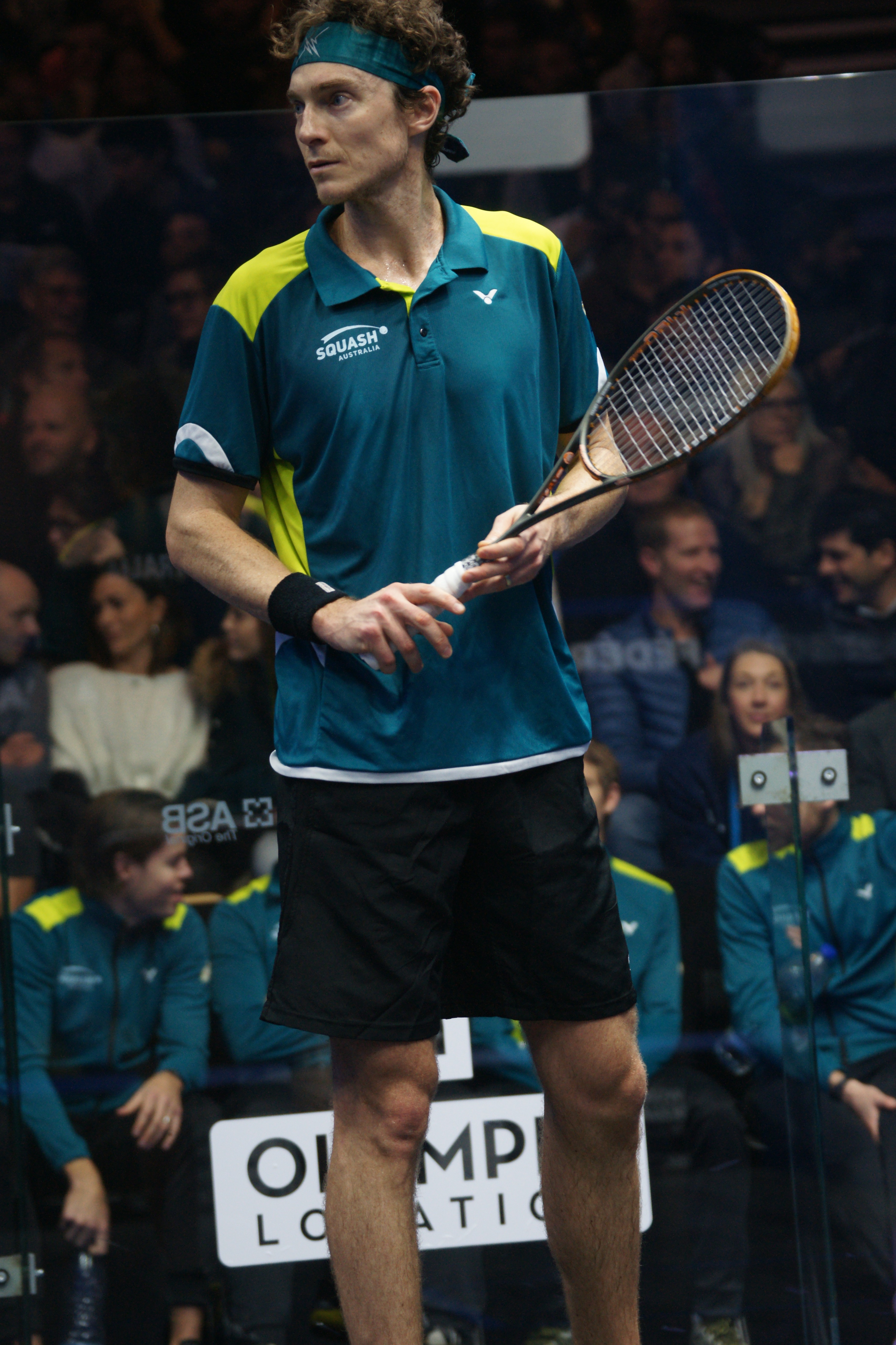 Cameron Pilley, championnats du monde de squash par équipe Marseille 2017